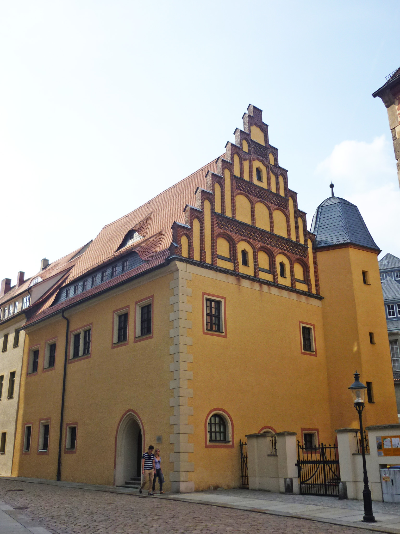 Am Dom 2 in der Altstadt von Freiberg (Sachsen)